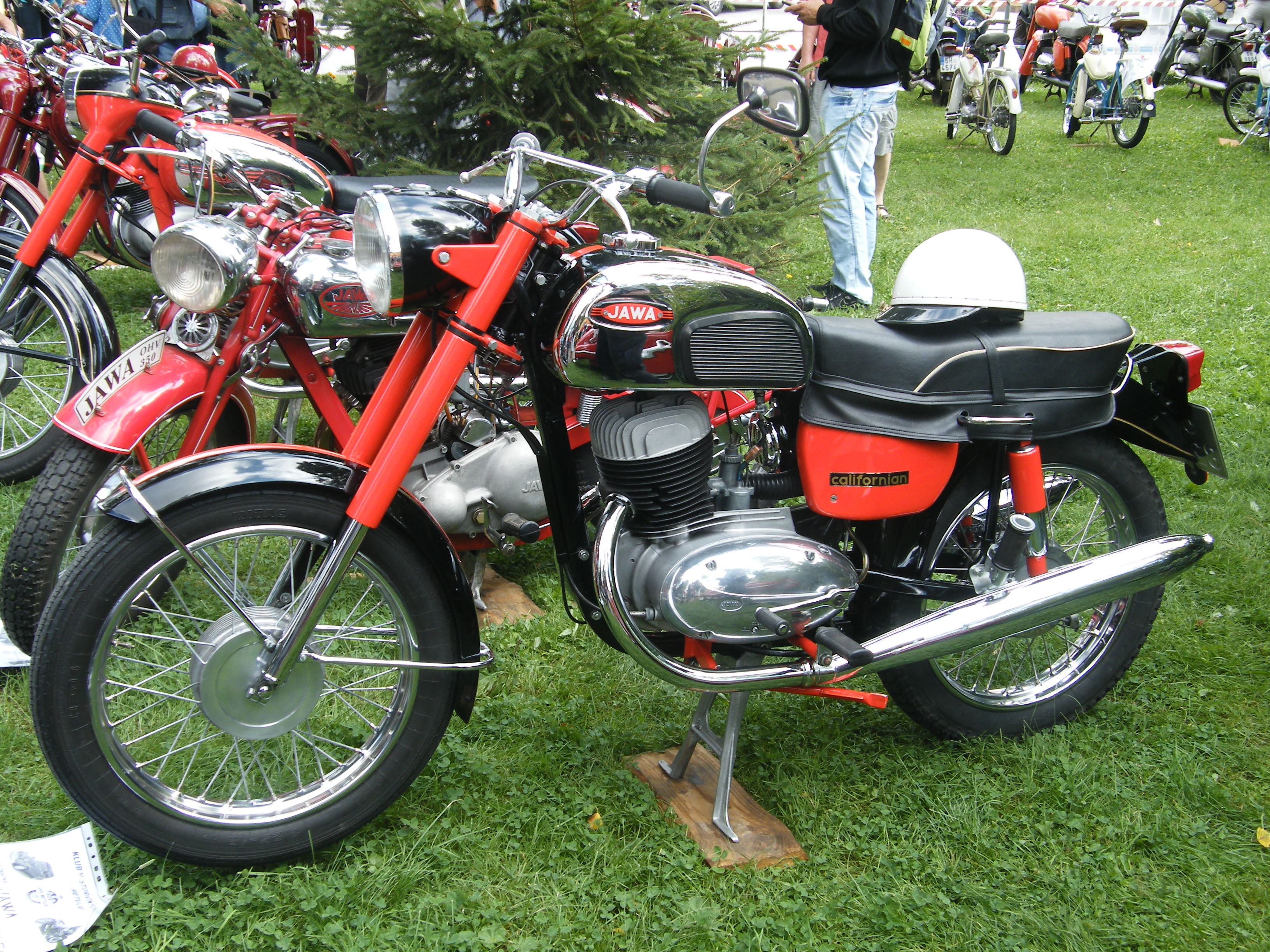 Jawa 250/590.05 Californian (1974)